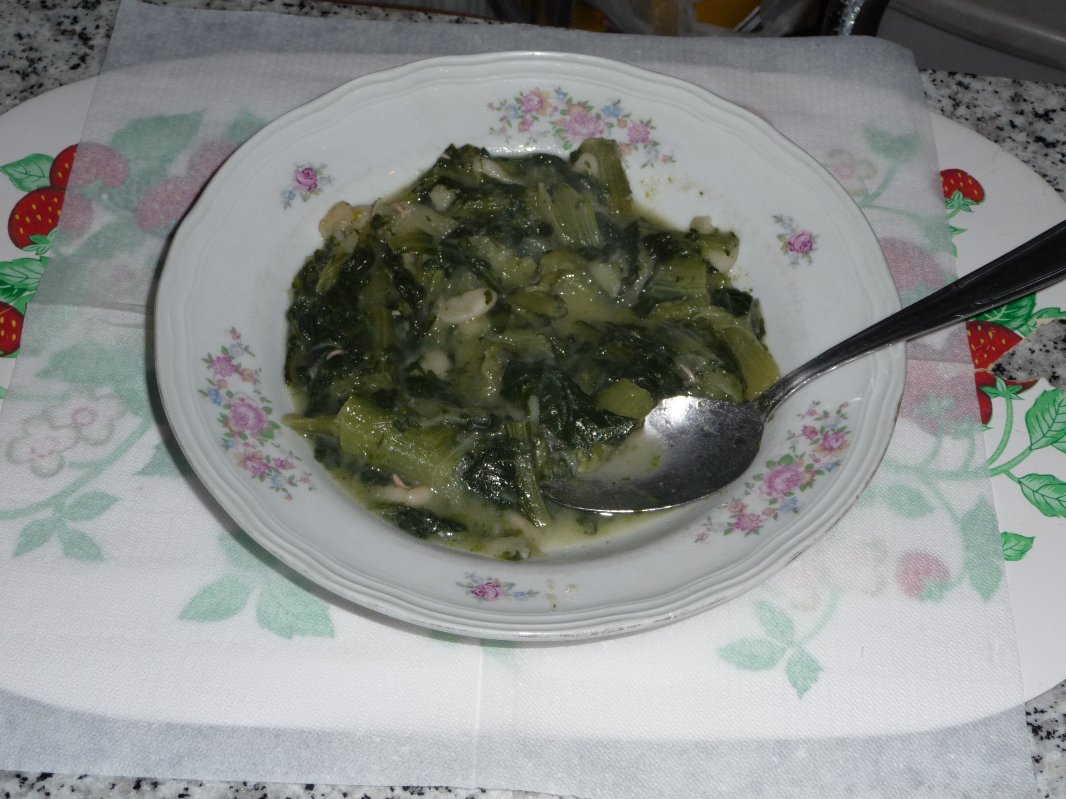 Scrajola cu posa - Catalana con fagioli